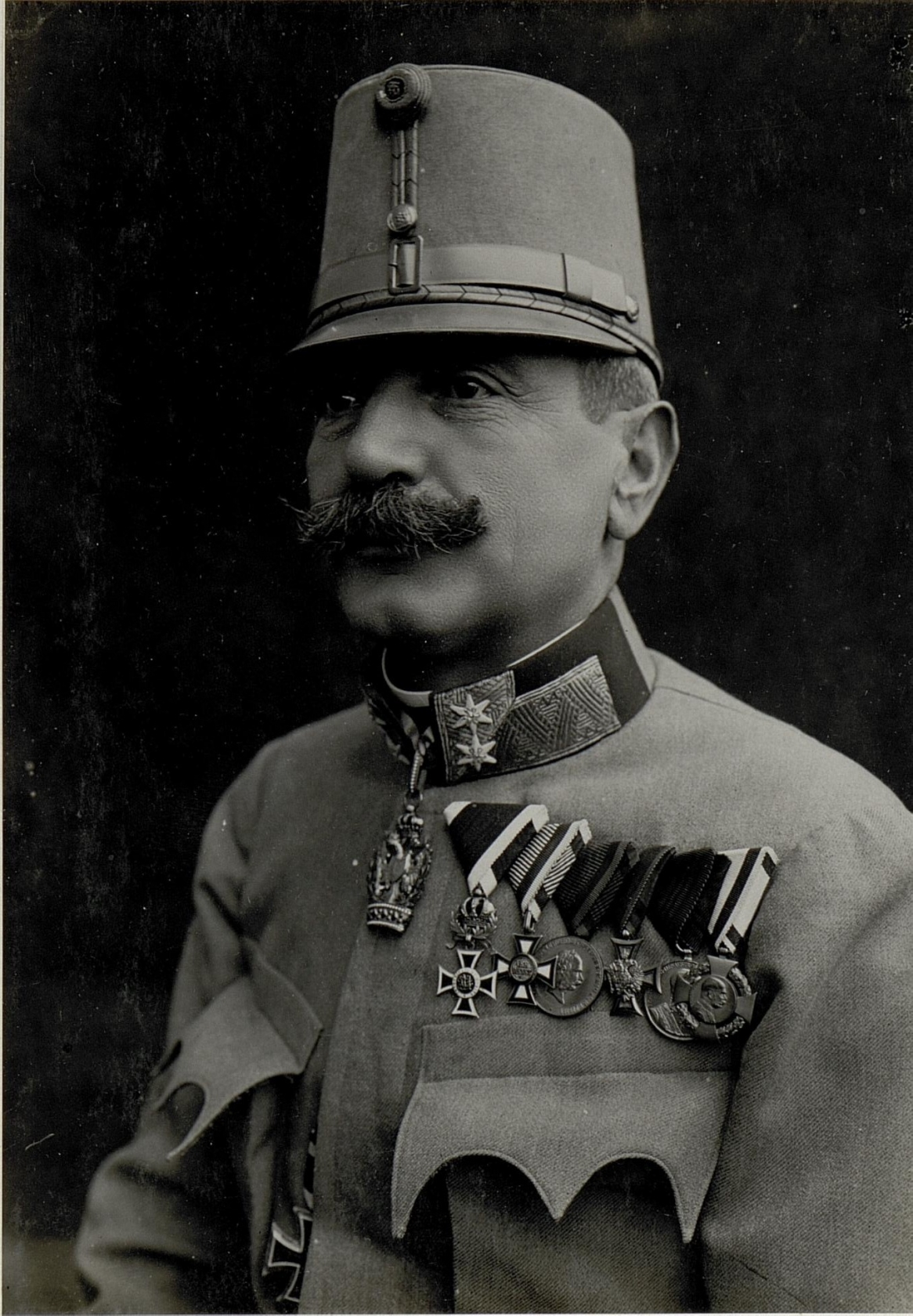 Feldmarschallleutnant Ernst Kletter Edler von Gromnik, Kommandeur des 9. Korps von Oktober 1916 bis August 1917